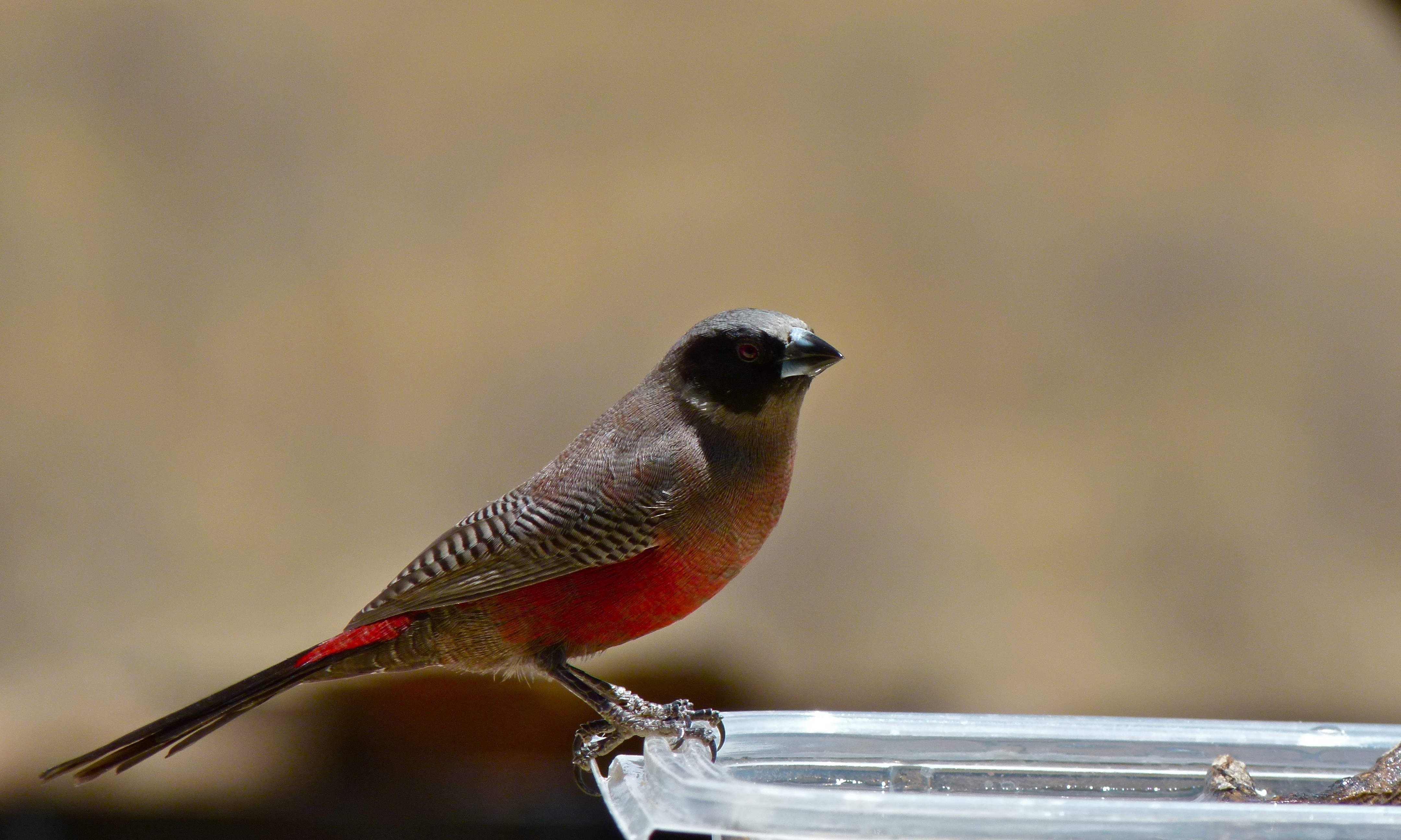 Grootkolk Camp, Kgalagadi Transfrontier Park, SOUTH AFRICA